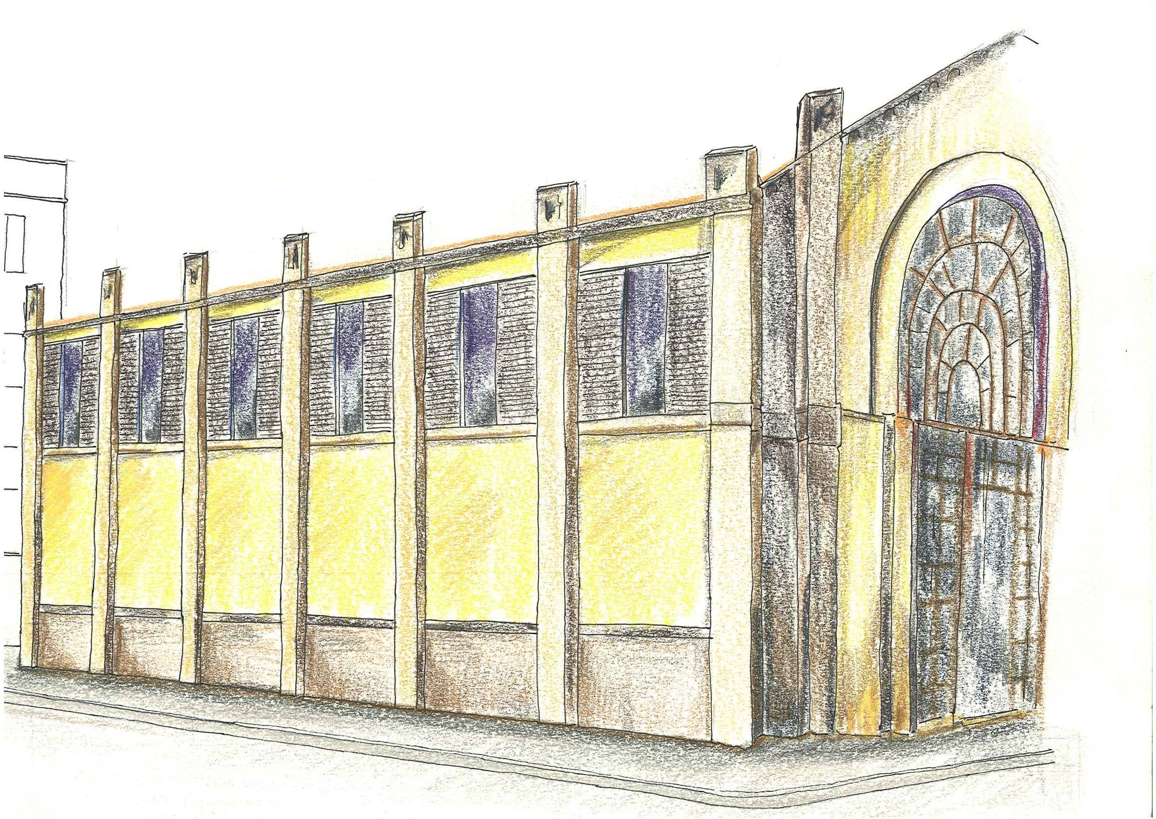 Vista de la façana lateral del l'antic Mercat de les Mandongueres. Atribuit a l'Arquitecte Ignasi Oms i Ponsa.